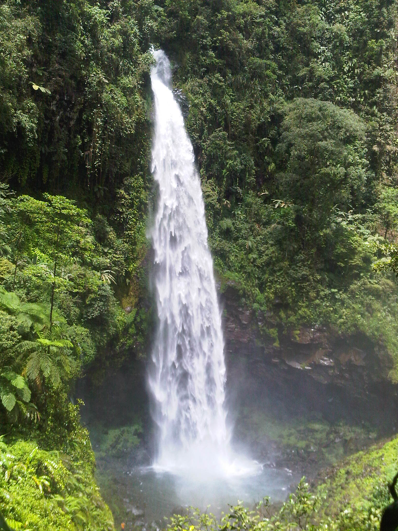 Air terjun Curug Cipendok - Waterfall